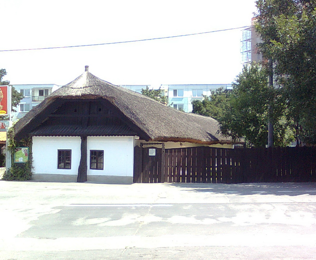 Dom ľudového bývania This medium shows the protected monument with the number 405-53/0 in the Slovak Republic.